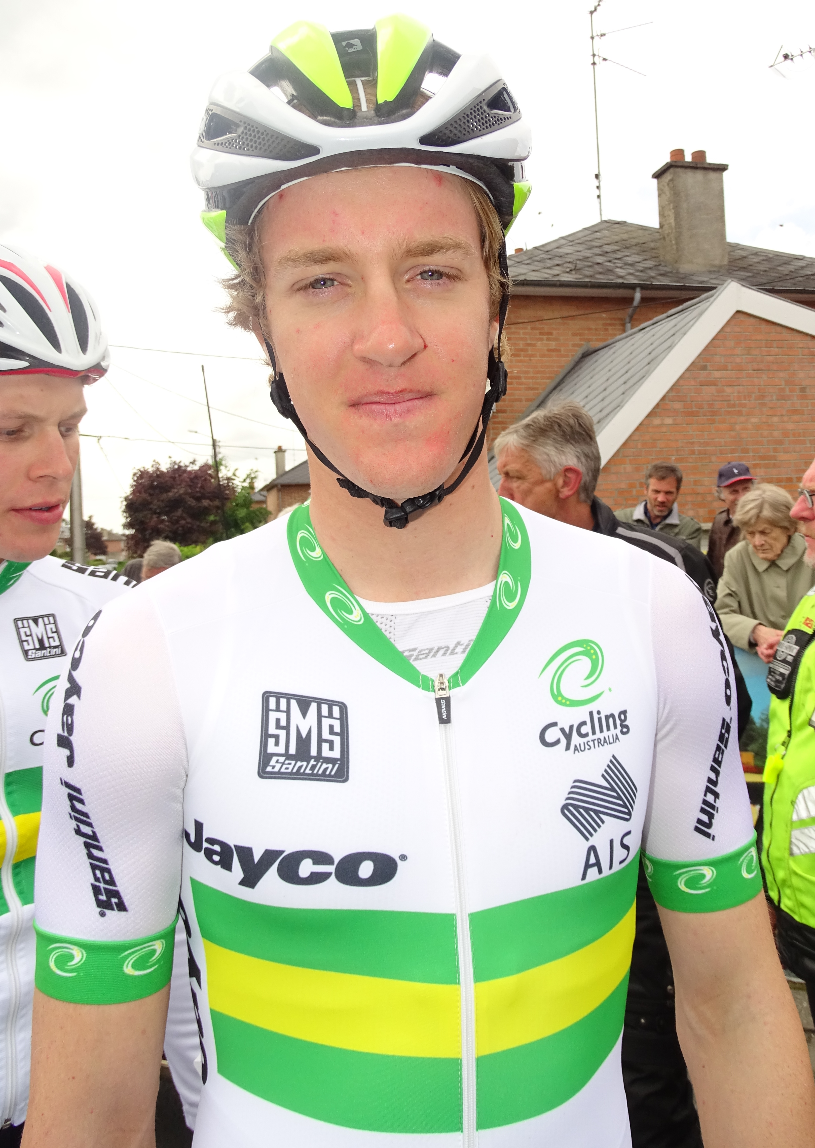 Reportage réalisé le vendredi 20 mai 2016 à l'occasion du départ de la première étape du Paris-Arras Tour 2016 à Douchy-les-Mines, Nord, Nord-Pas-de-Calais-Picardie, France.